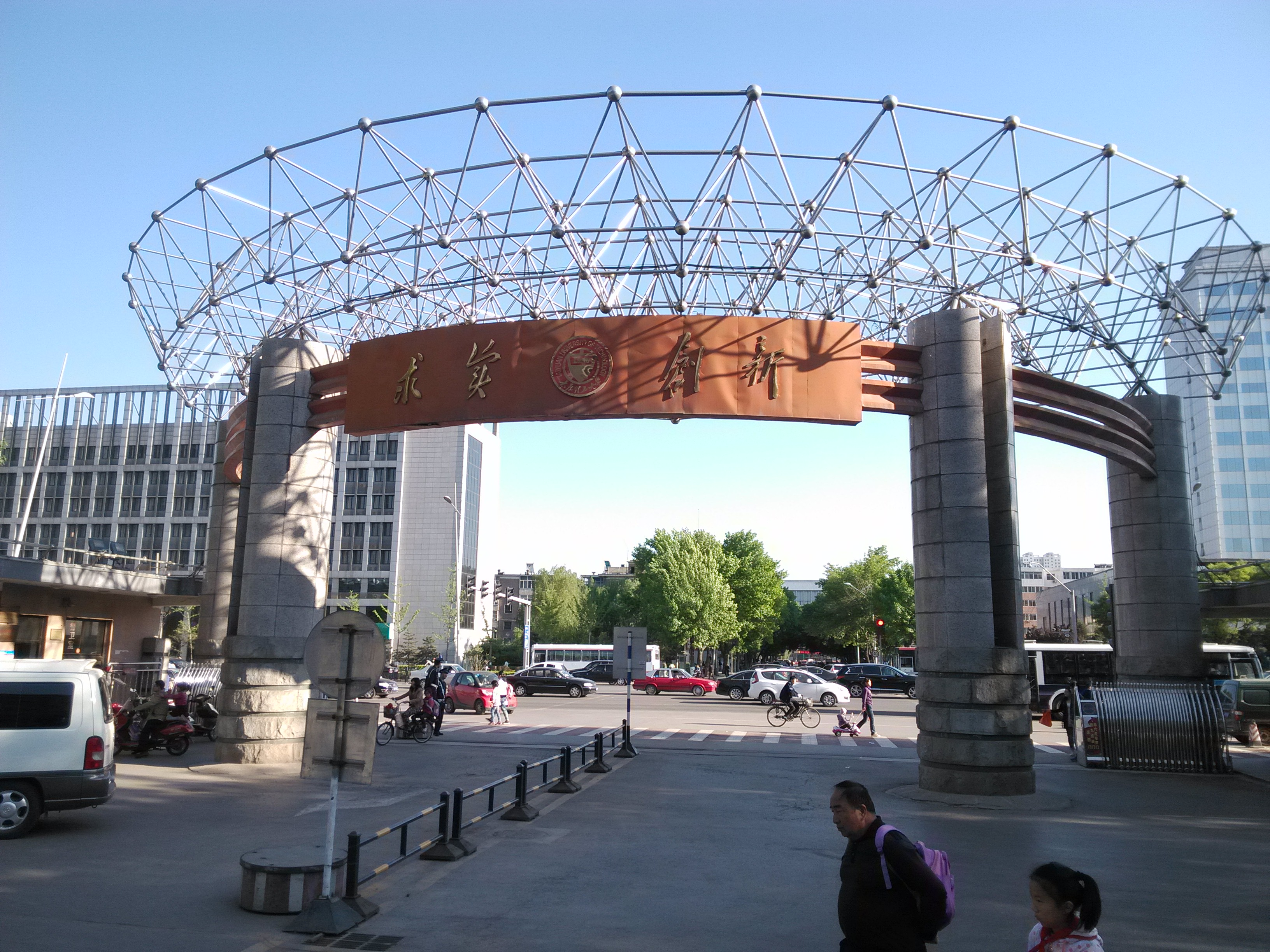 中文（中国大陆）: 太原理工大学迎西校区进强门（南门）。摄于进强门北侧。